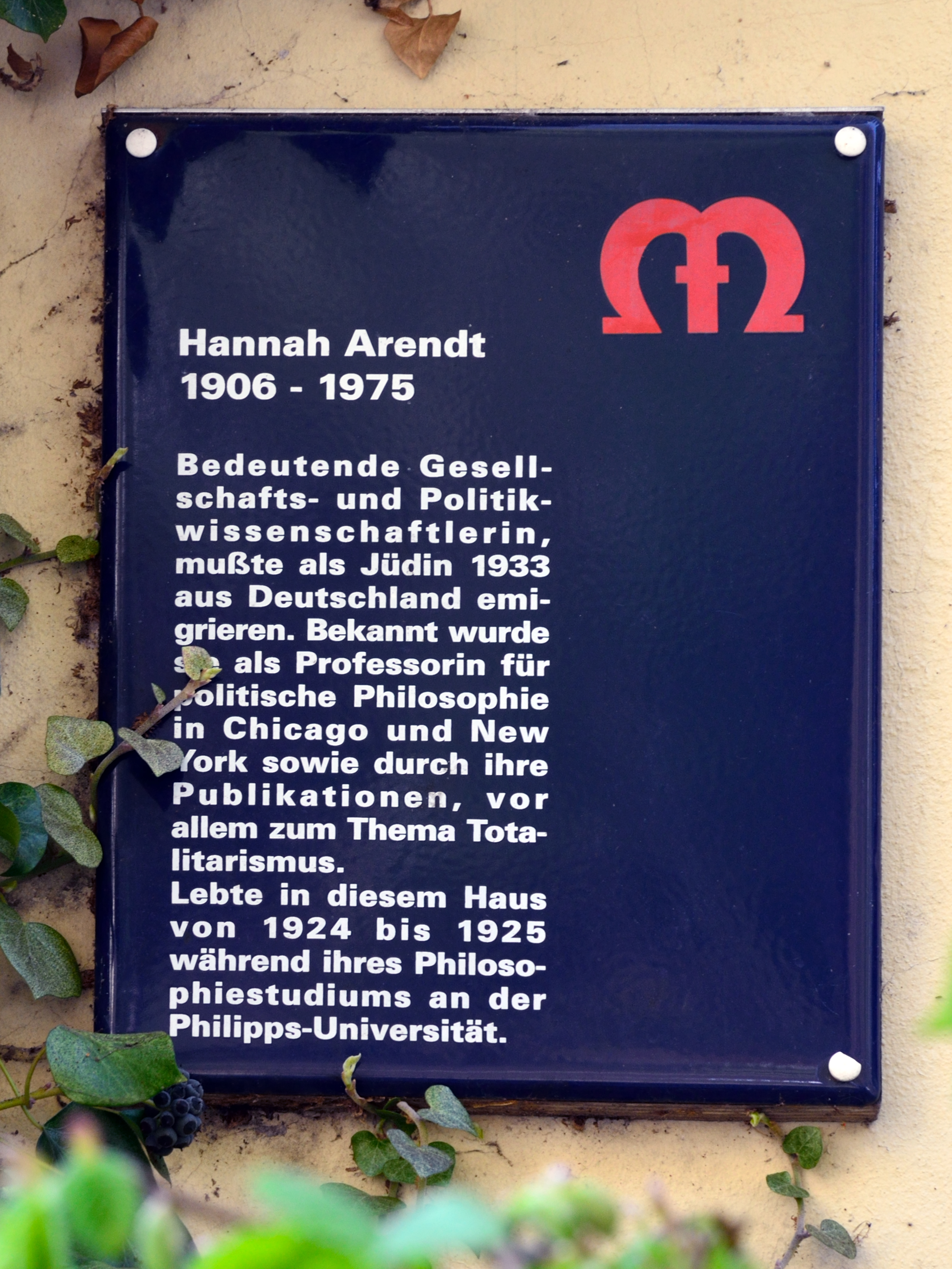 Tafel an Hannah Arendts kurzzeitigem Wohnhaus in Marburg, Lutherstr. 4